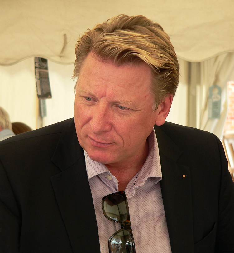 Ludger Abeln moderiert beim 85. Tag für Denkmalpflege in Oldenburg